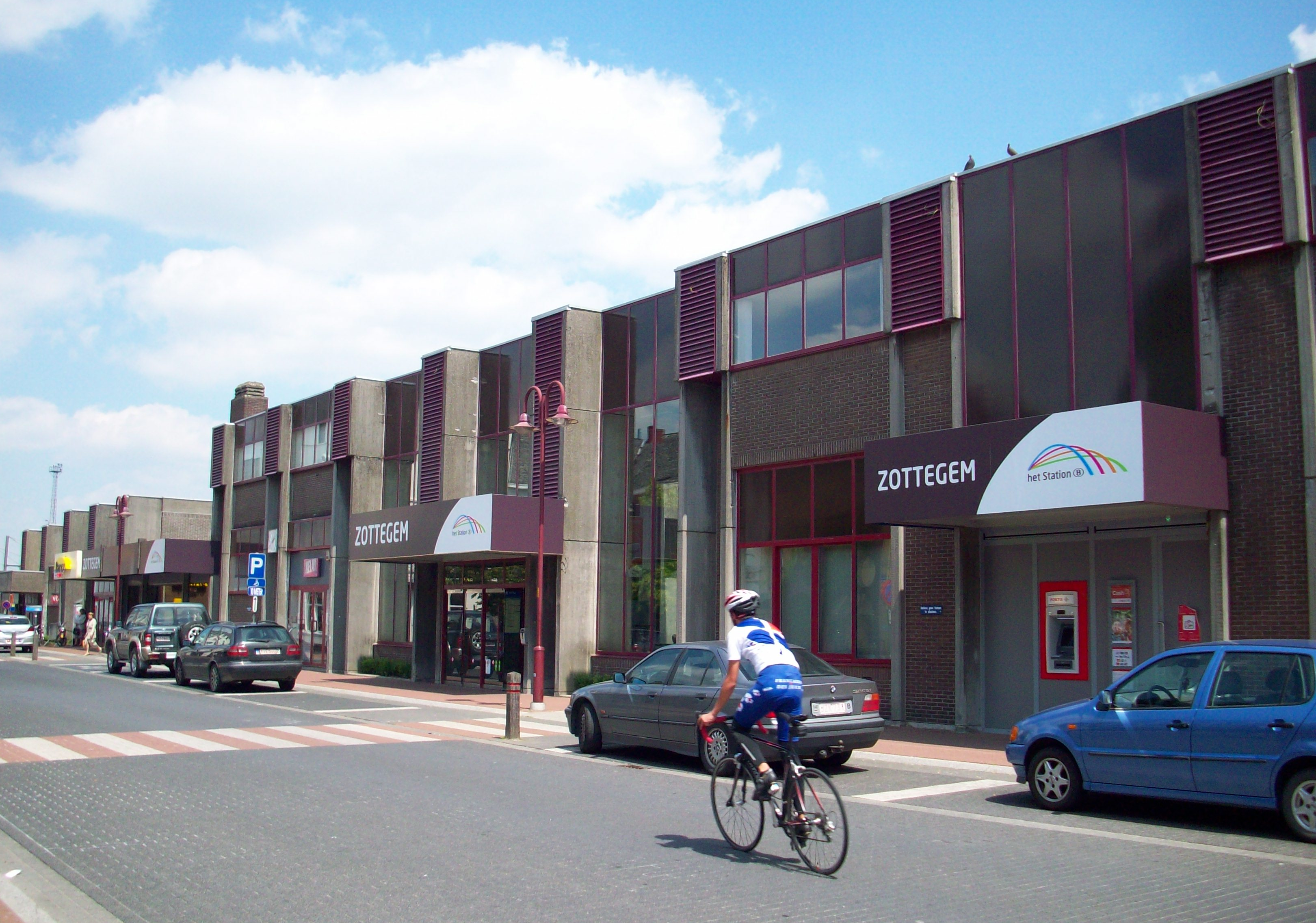 Station Zottegem